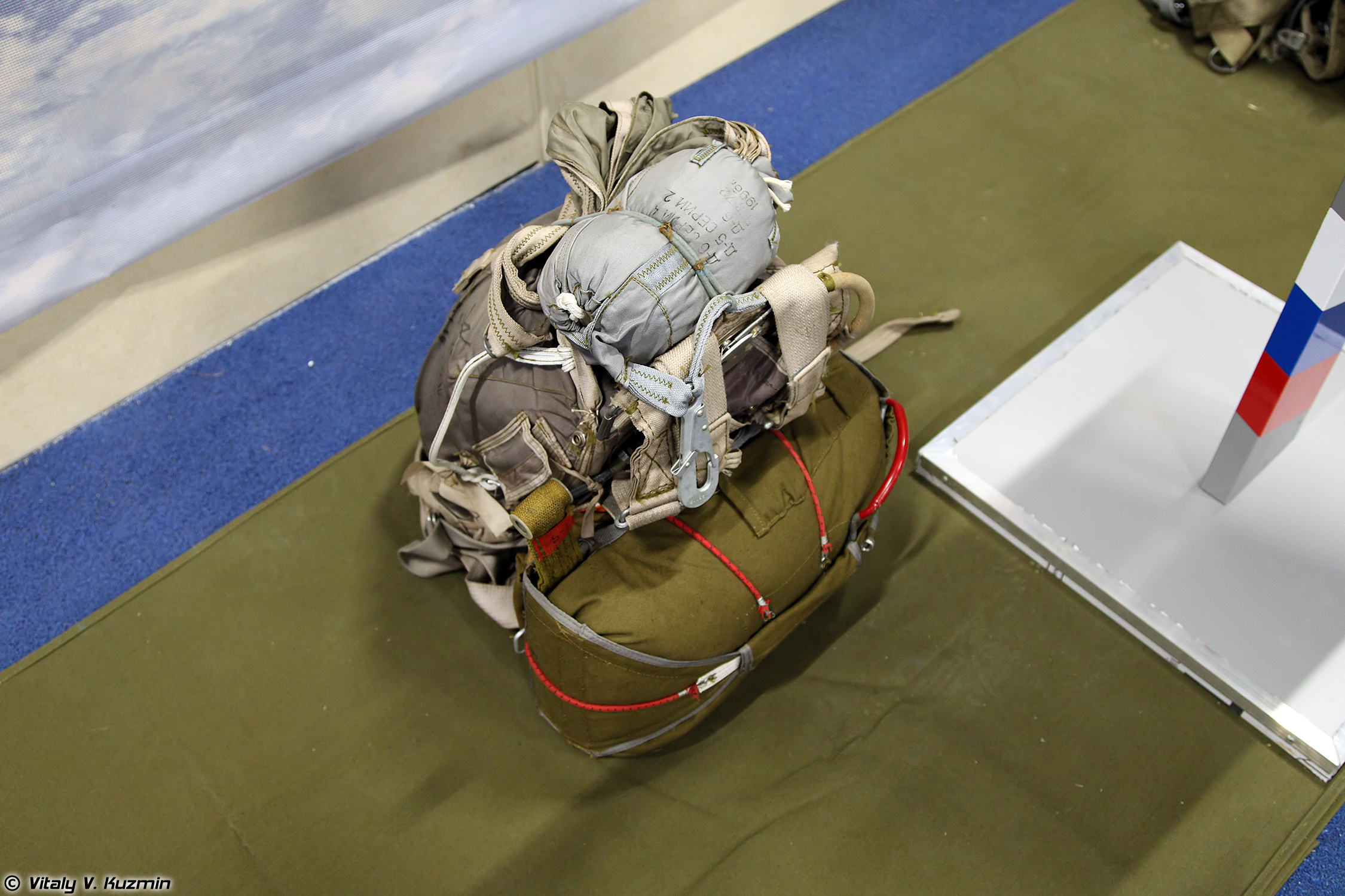 Парашютная система Д-6 серии 4 (D-6 series 4 parachute)